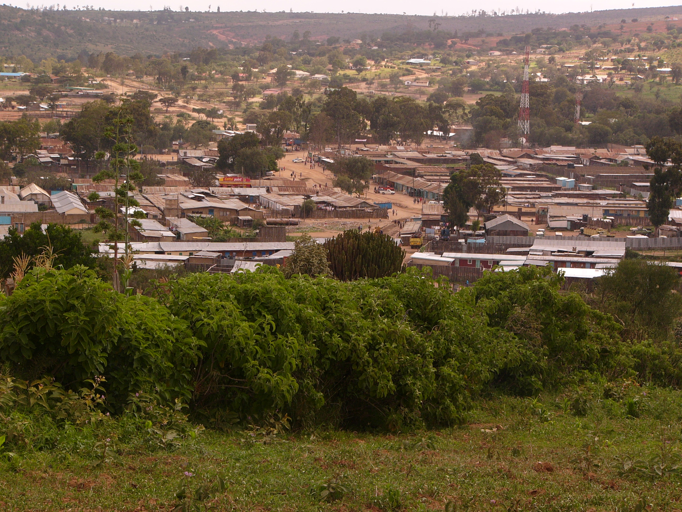 Maralal